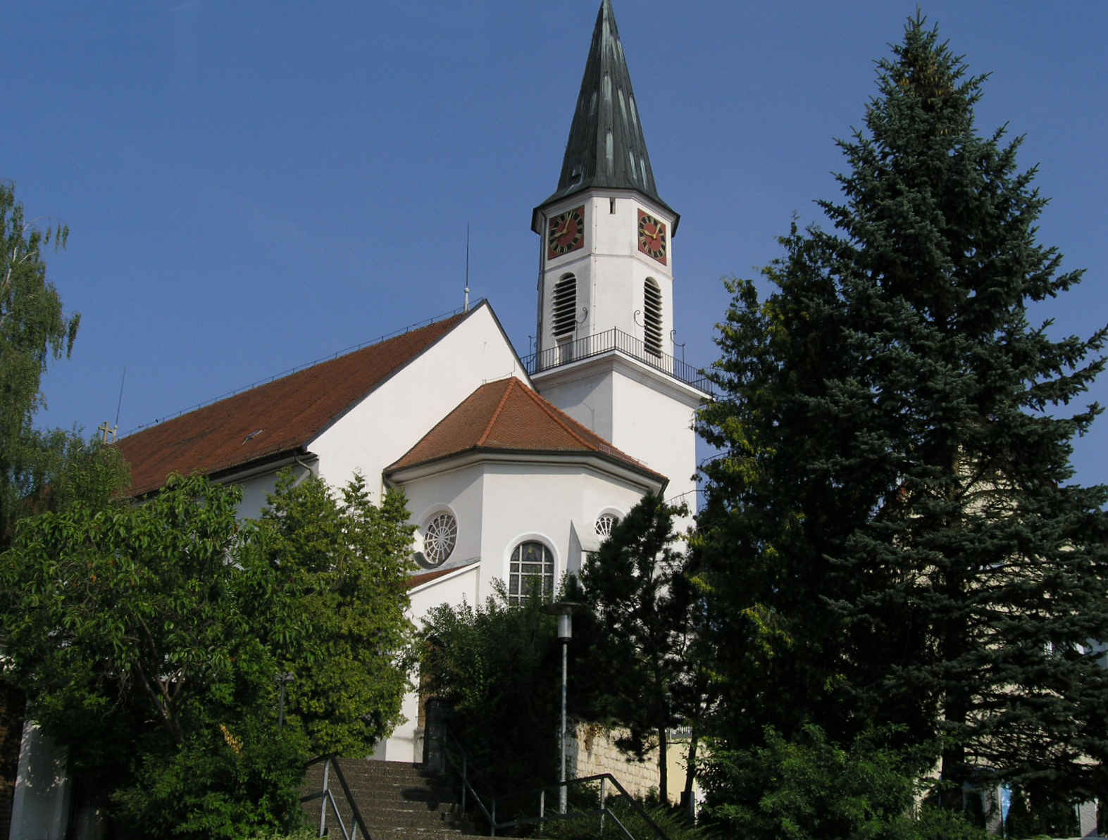 Tomerdingen - Liebfrauenkirche Date: 30 July 2006